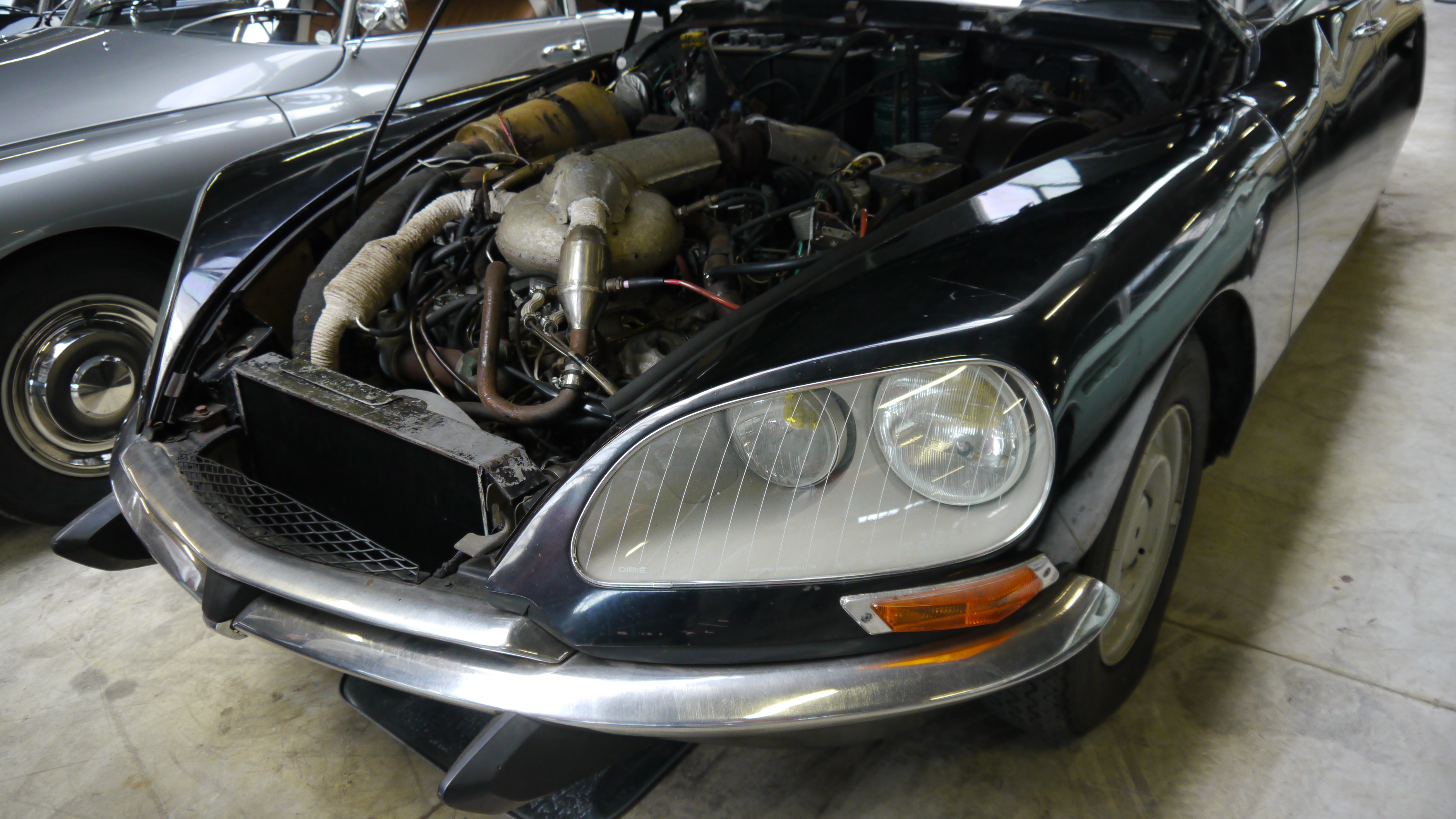 Conservatoire Citroen 101 Citroen DS